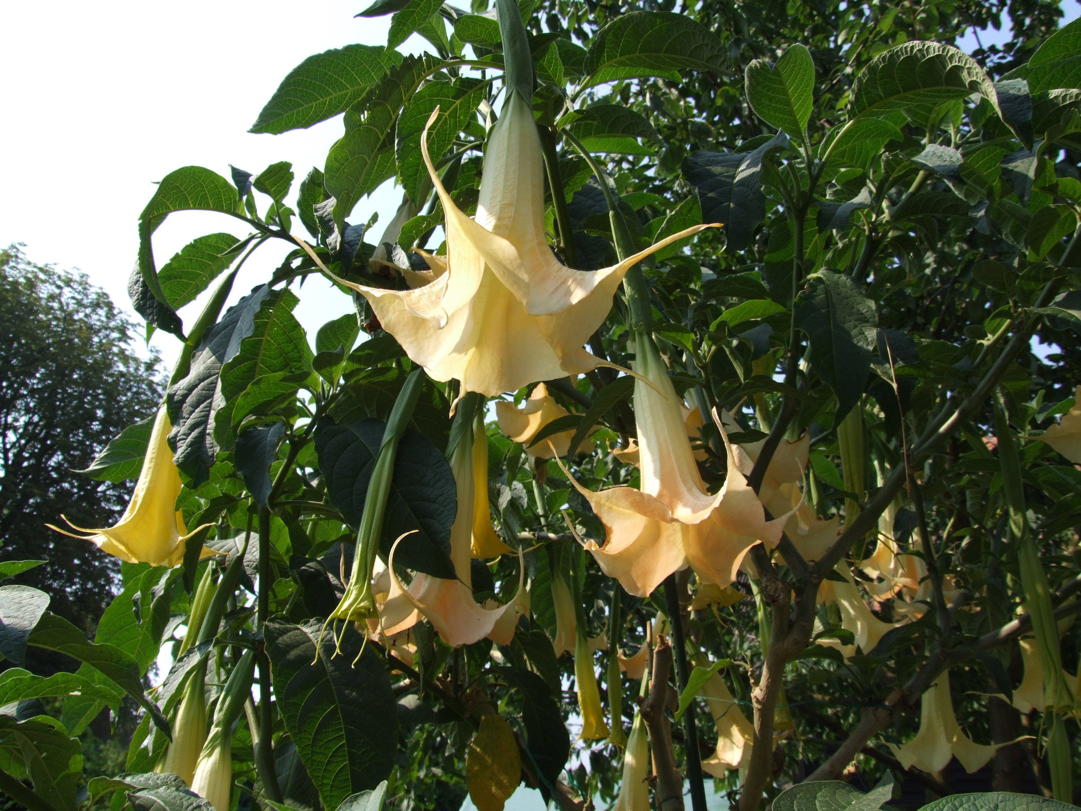 Brugmansia